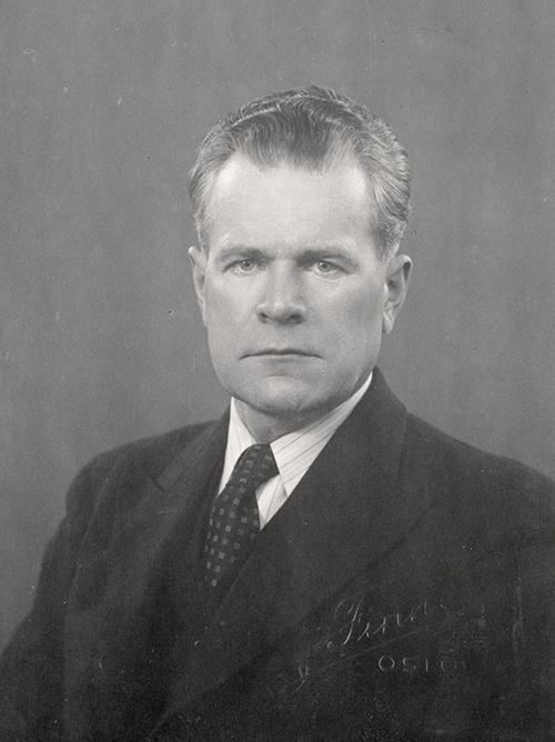 Olav Benum (1897–1990), stortingsmann (Venstre) for Nord-Trøndelag 1945–1961.